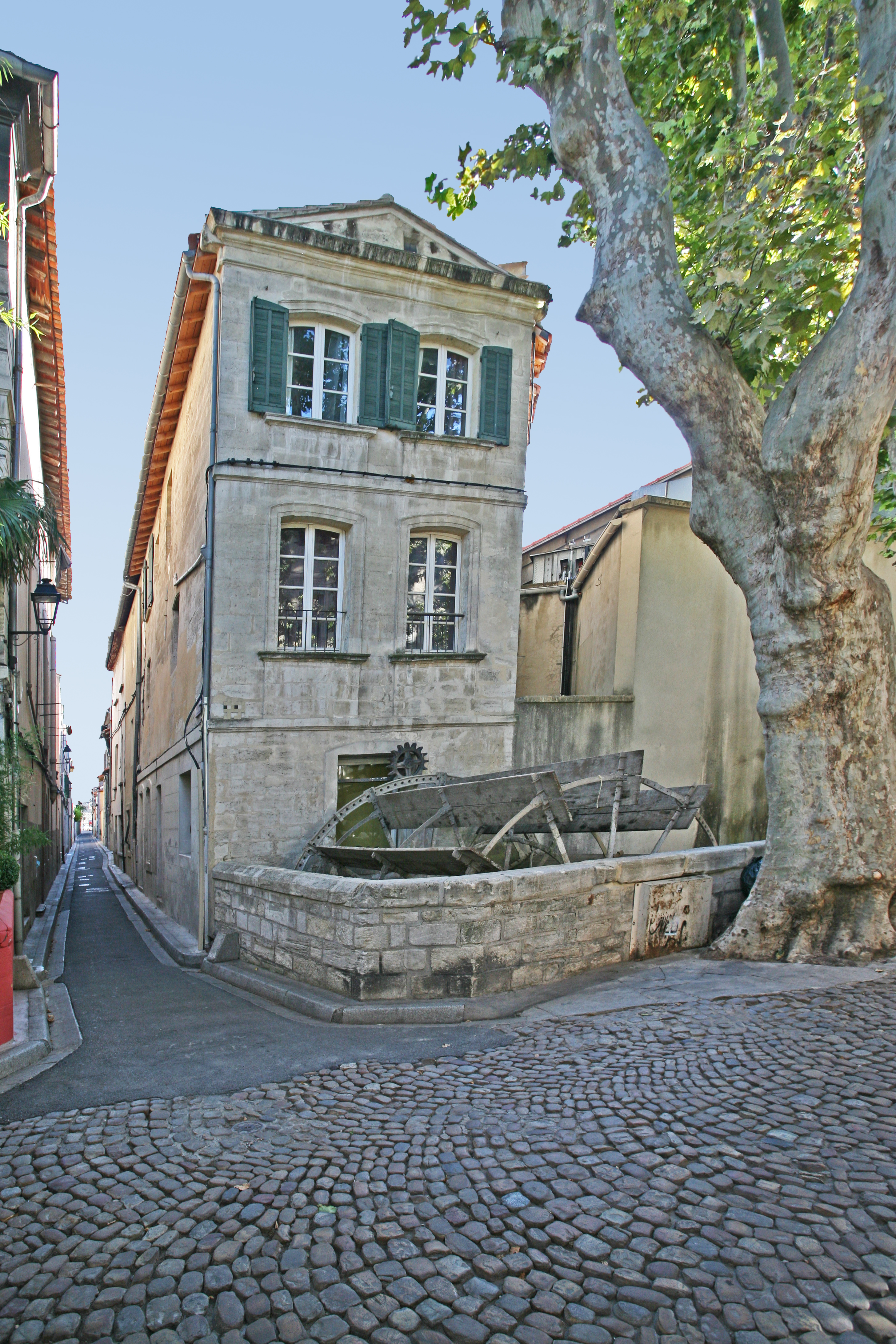 Maison de Jean-Henri Fabre, 14 rue des Teinturiers, Avignon, Vaucluse, France